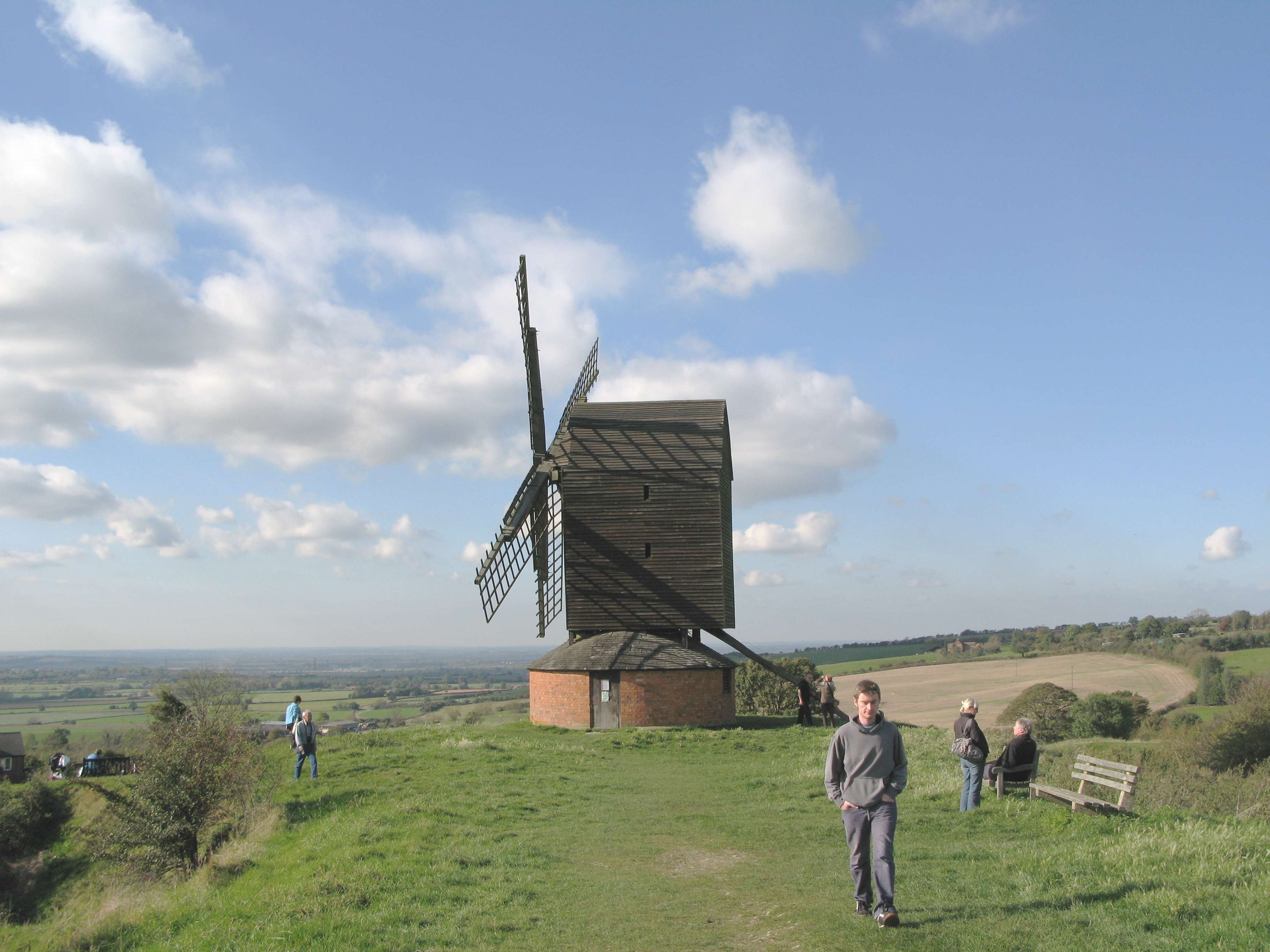 Wandmille vu Brill (England).